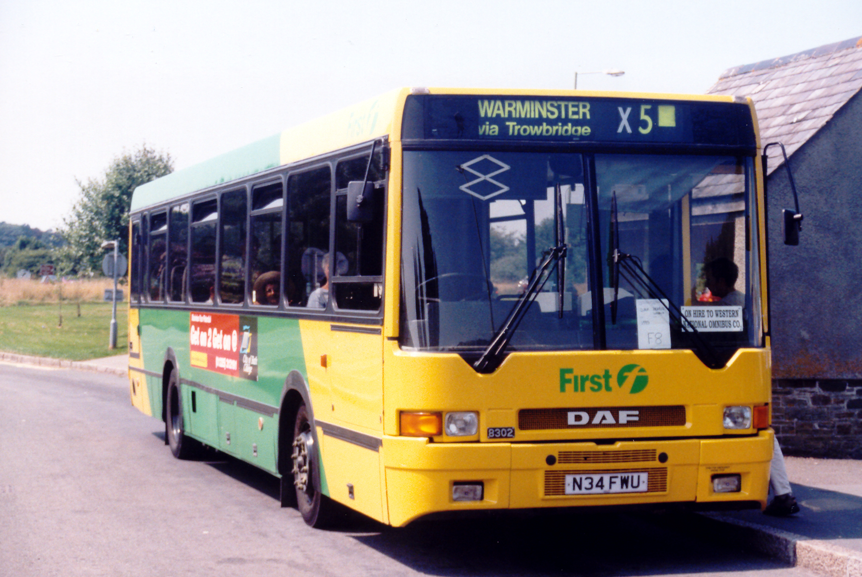 29/07/2001 Yelverton